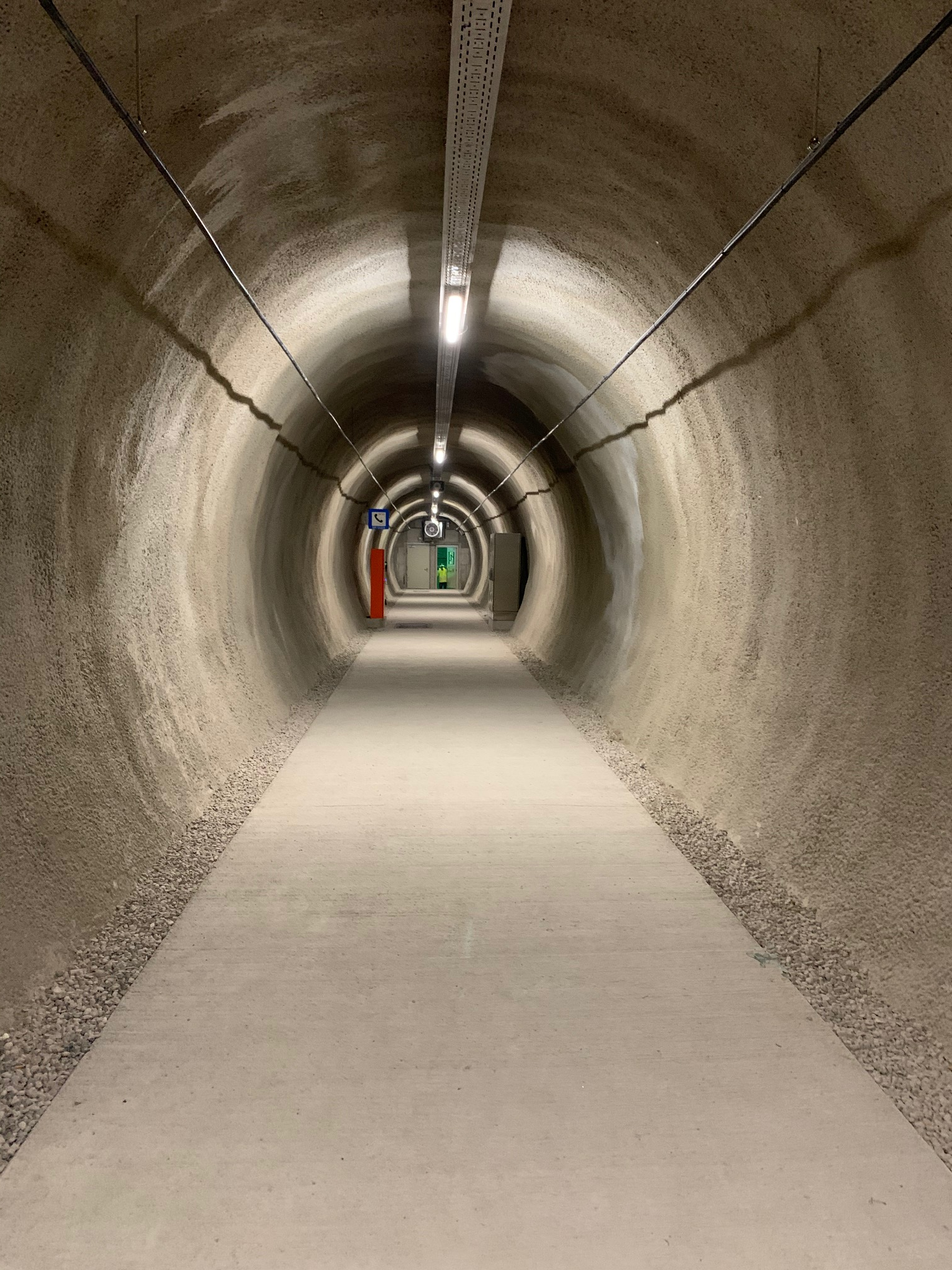 Innenansicht Fluchtstollen Karawankentunnel